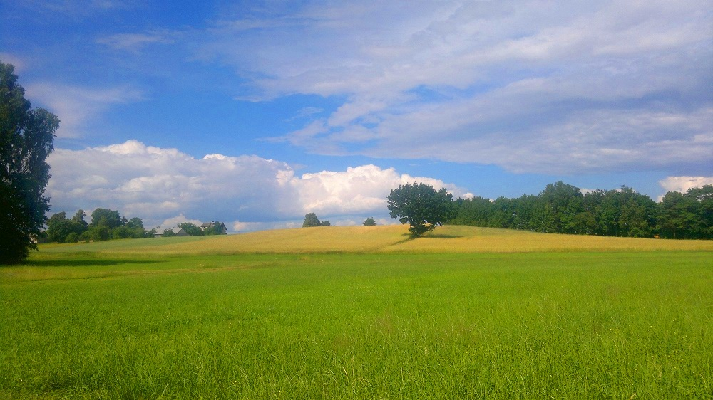 Wygranka, gm. Kłoczew